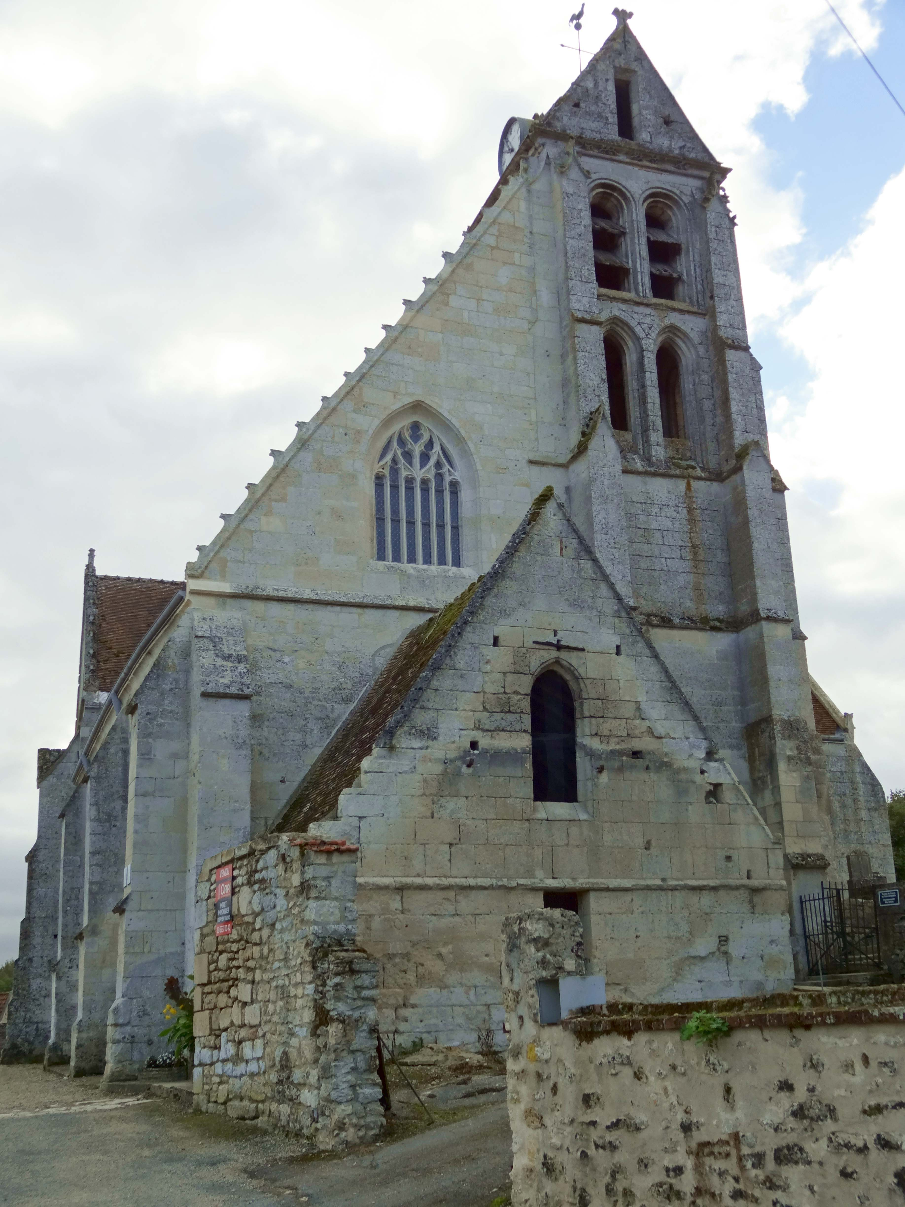 Église Saint-Denis de Fresnoy-la-Rivière - voir titre.